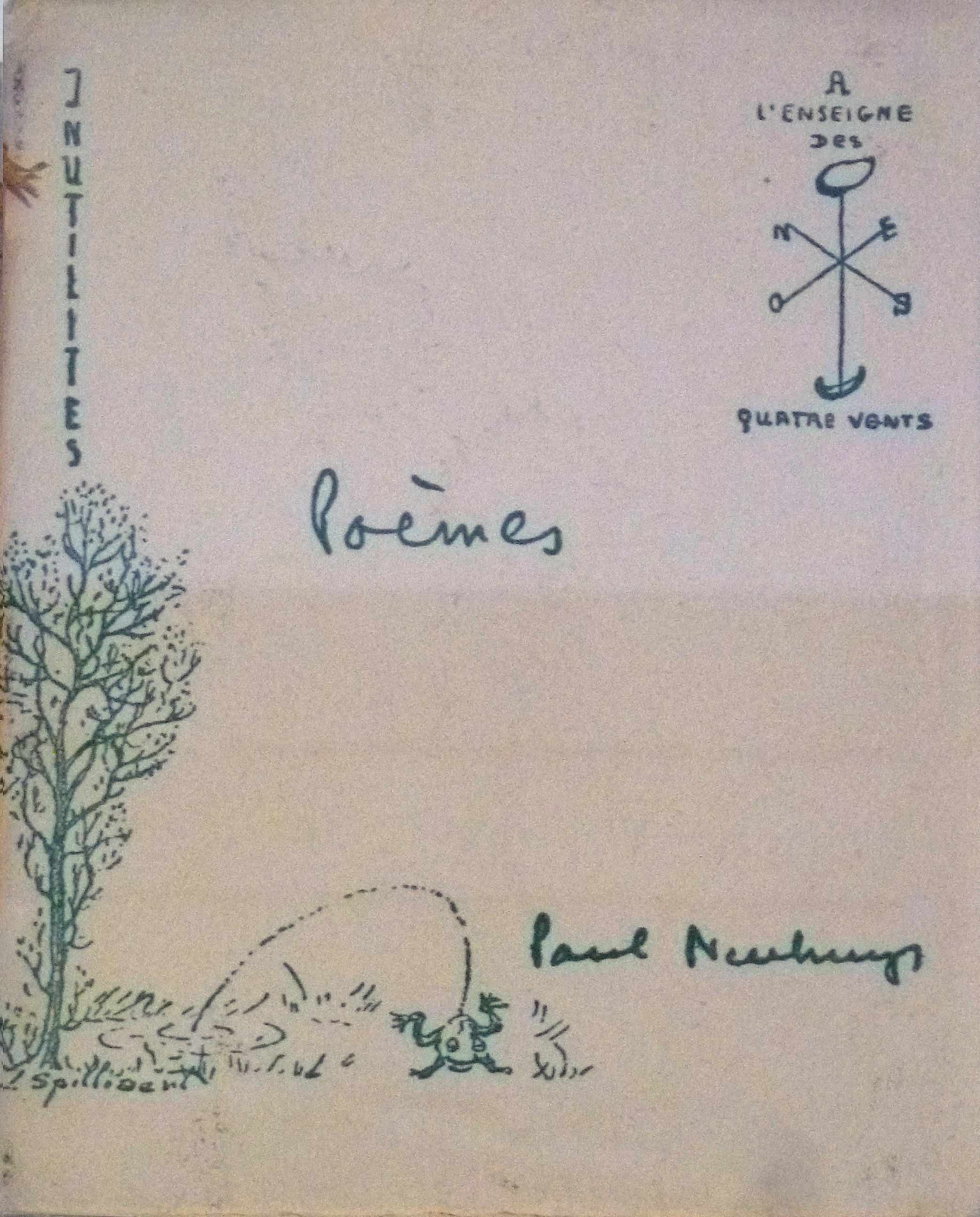 Omslag van het boek "Inutilités" van Paul Neuhuys; illustraties door Léon Spilliaert (1941); gedrukte uitgave (163 x 123 mm); verzameling van Het Spilliaert Huis, Oostende